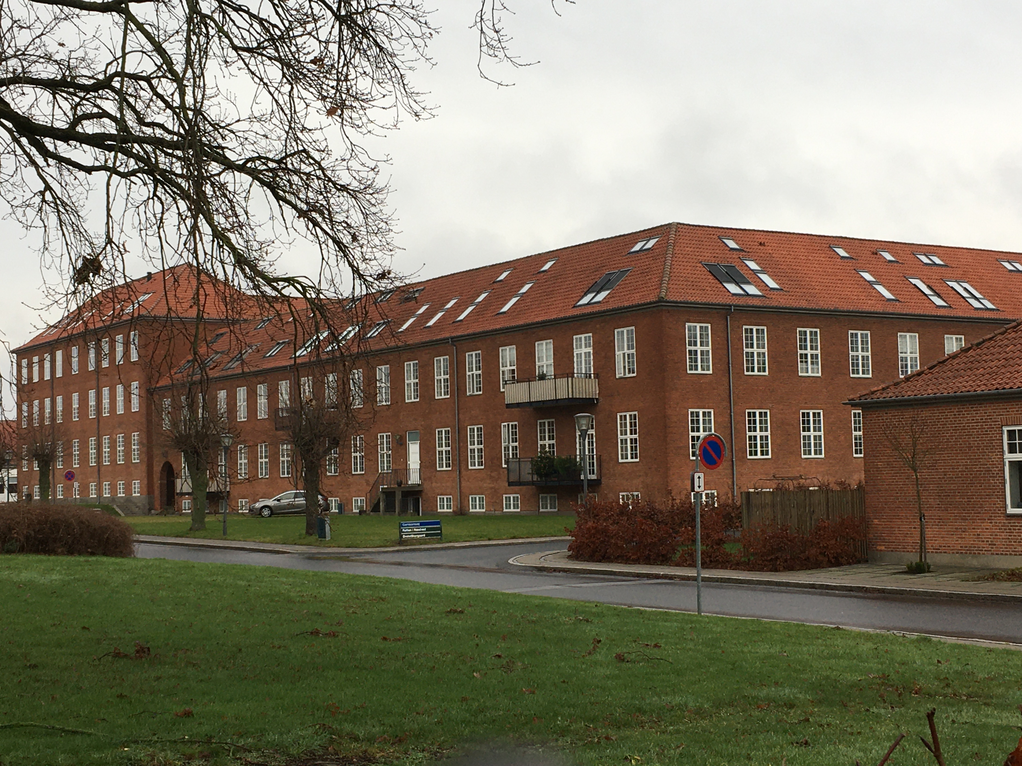 Hjemsted for Retten i Næstved